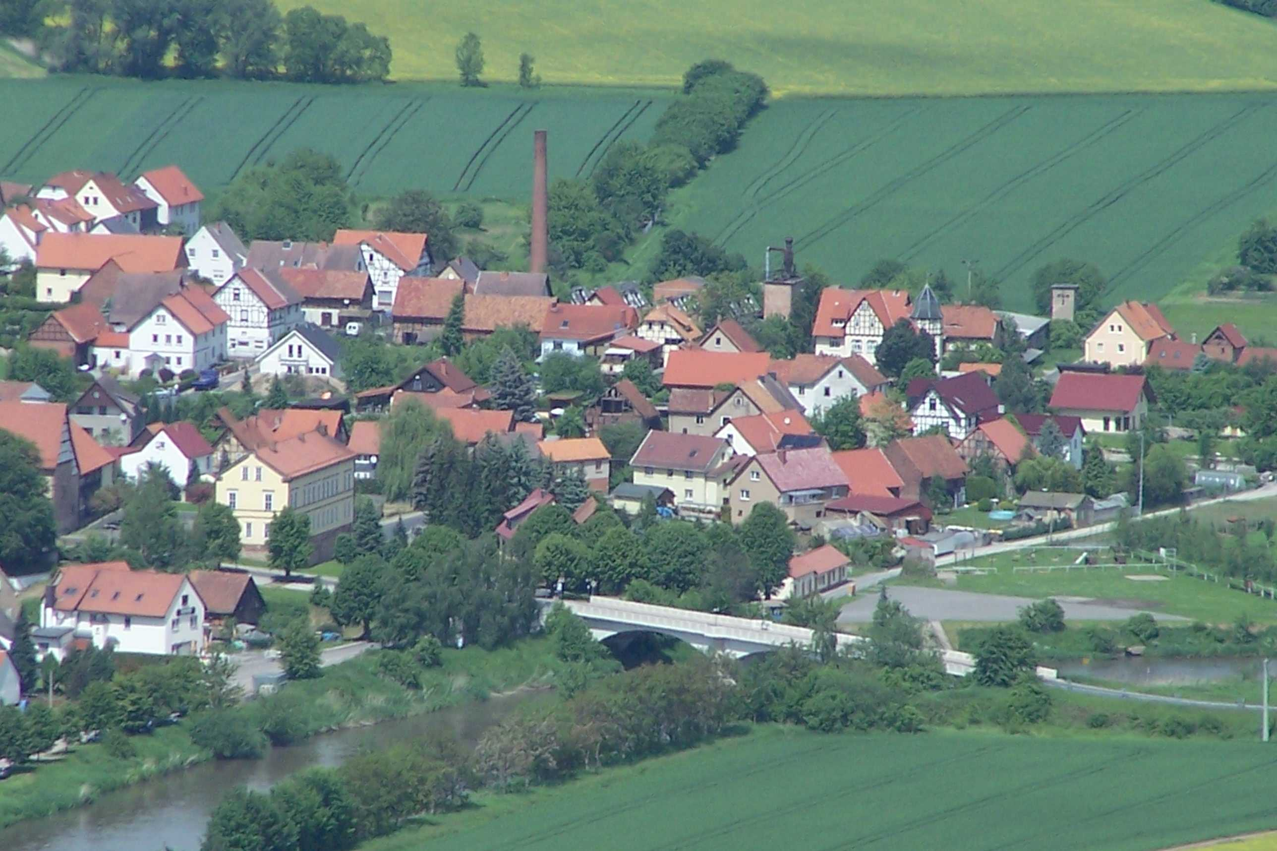 Teilansicht von Großburschla, der historische Ortskern am Werraufer.